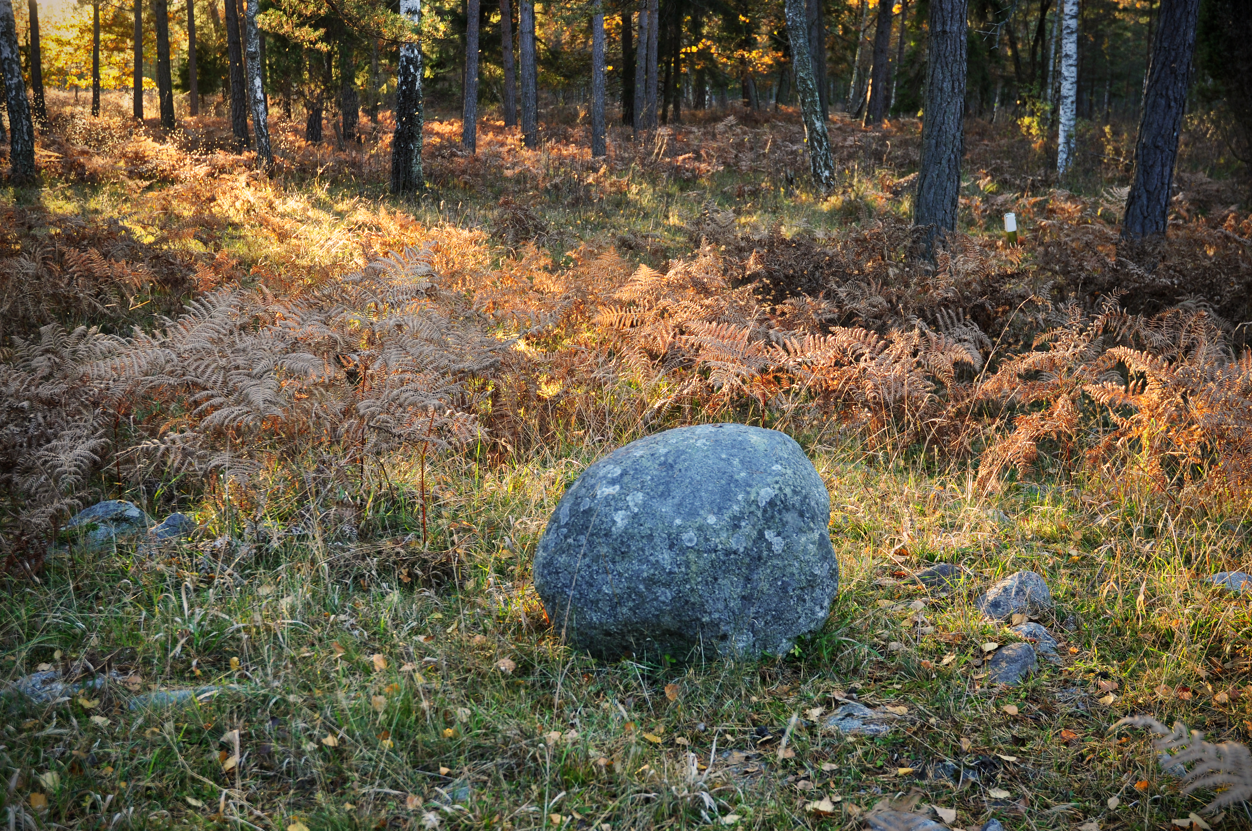 Fröjel 40:1. Gravklot, Sälle gravfält nära Vallhagar, Gotland, Sverige.